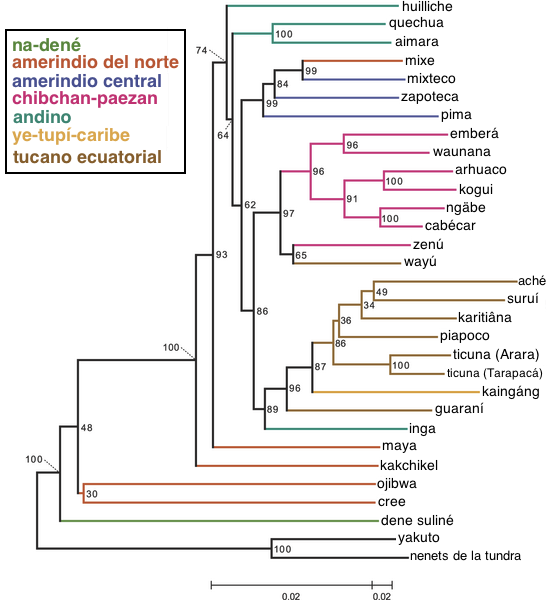 Este mapa es una traducción de un árbol genético autosómico de los pueblos indígenas de la América. El idioma de la versión original es inglés. El archivo original es File:Journal.pgen.0030185.g008.png Hay una descripción allá.